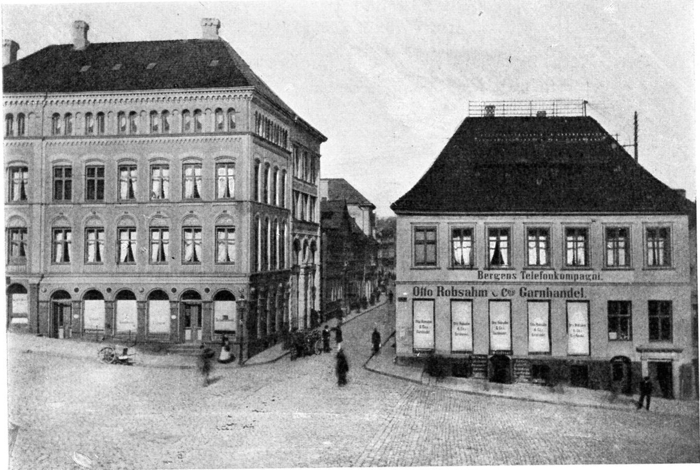 Strandgaten sett fra Småstrandgaten ca 1882